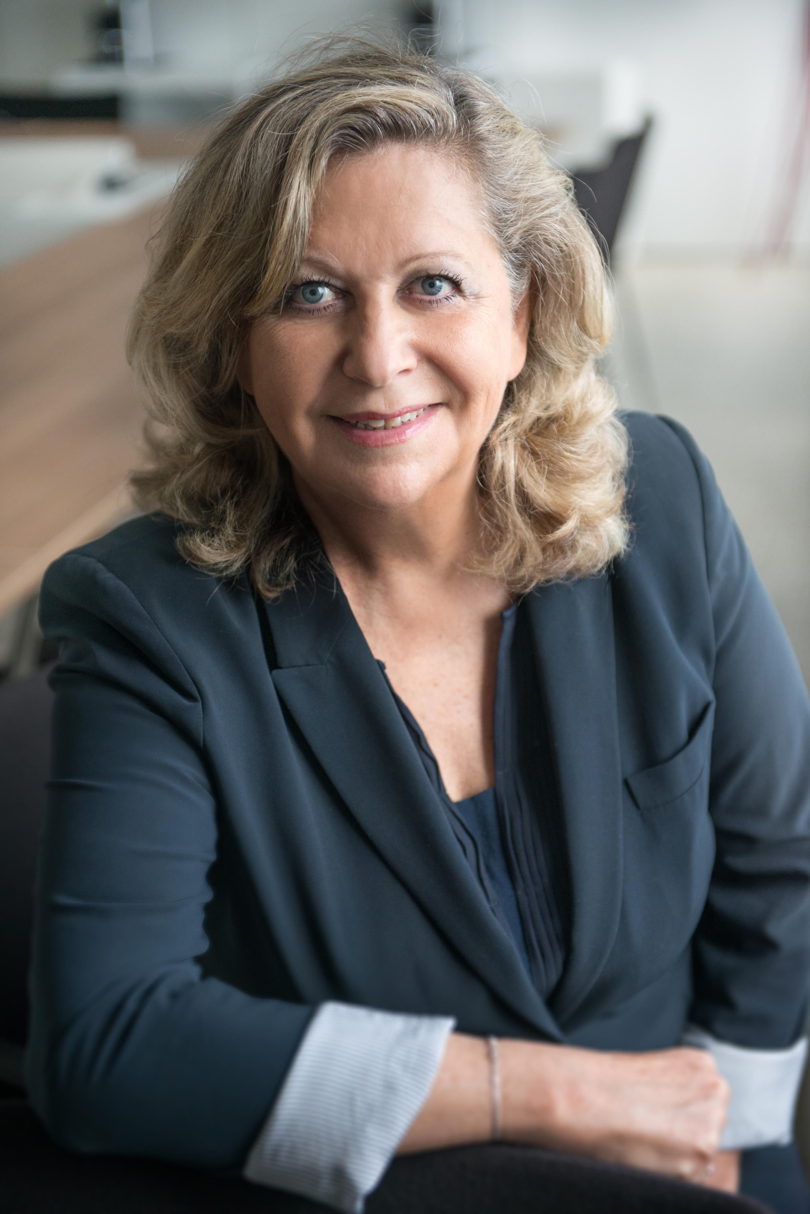 Daniele Giazzi